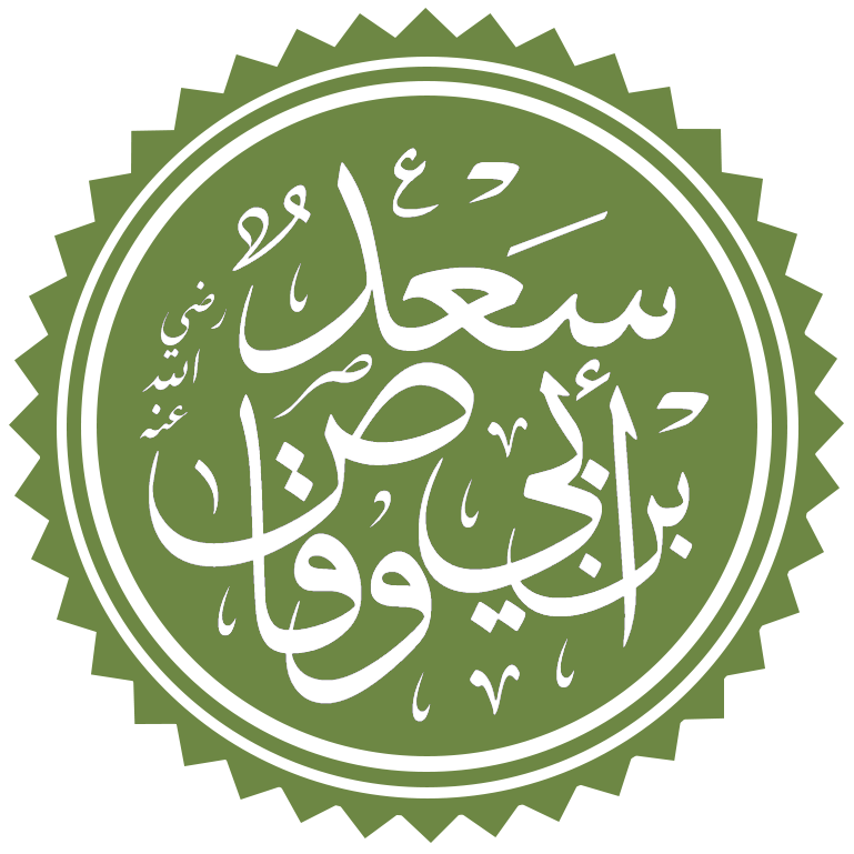 تخطيط لاسم الصحابي الجليل سعد بن أبي وقاص رضي الله عنه